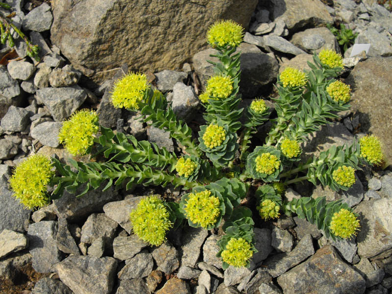 Rhodiola rosea